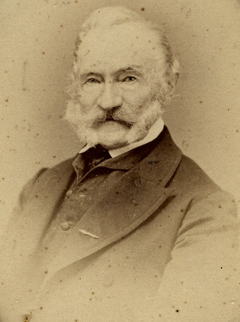 Ahnenbilder